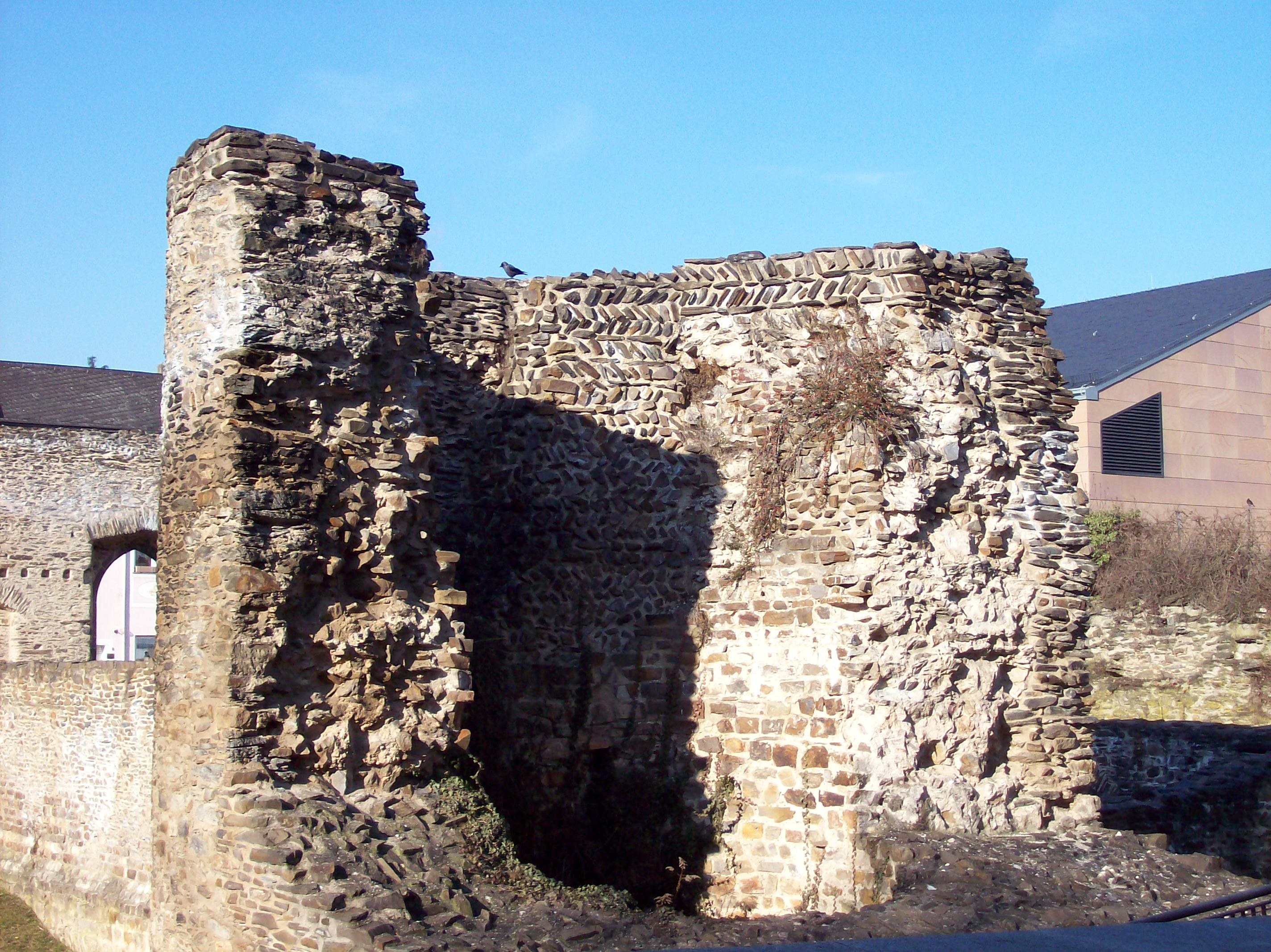 Turm 9 des römischen Kastells Boppard